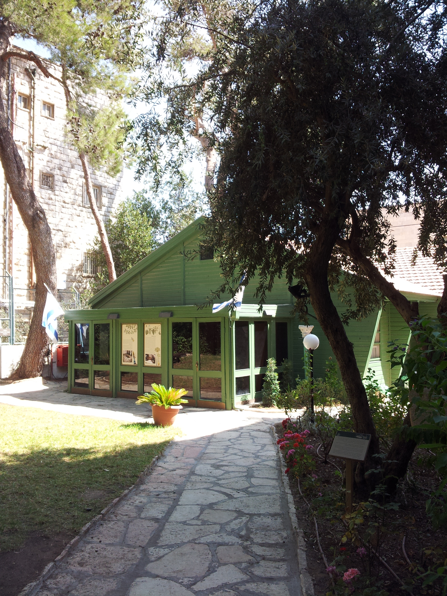 מראה במתחם יד יצחק בן צבי בירושלים